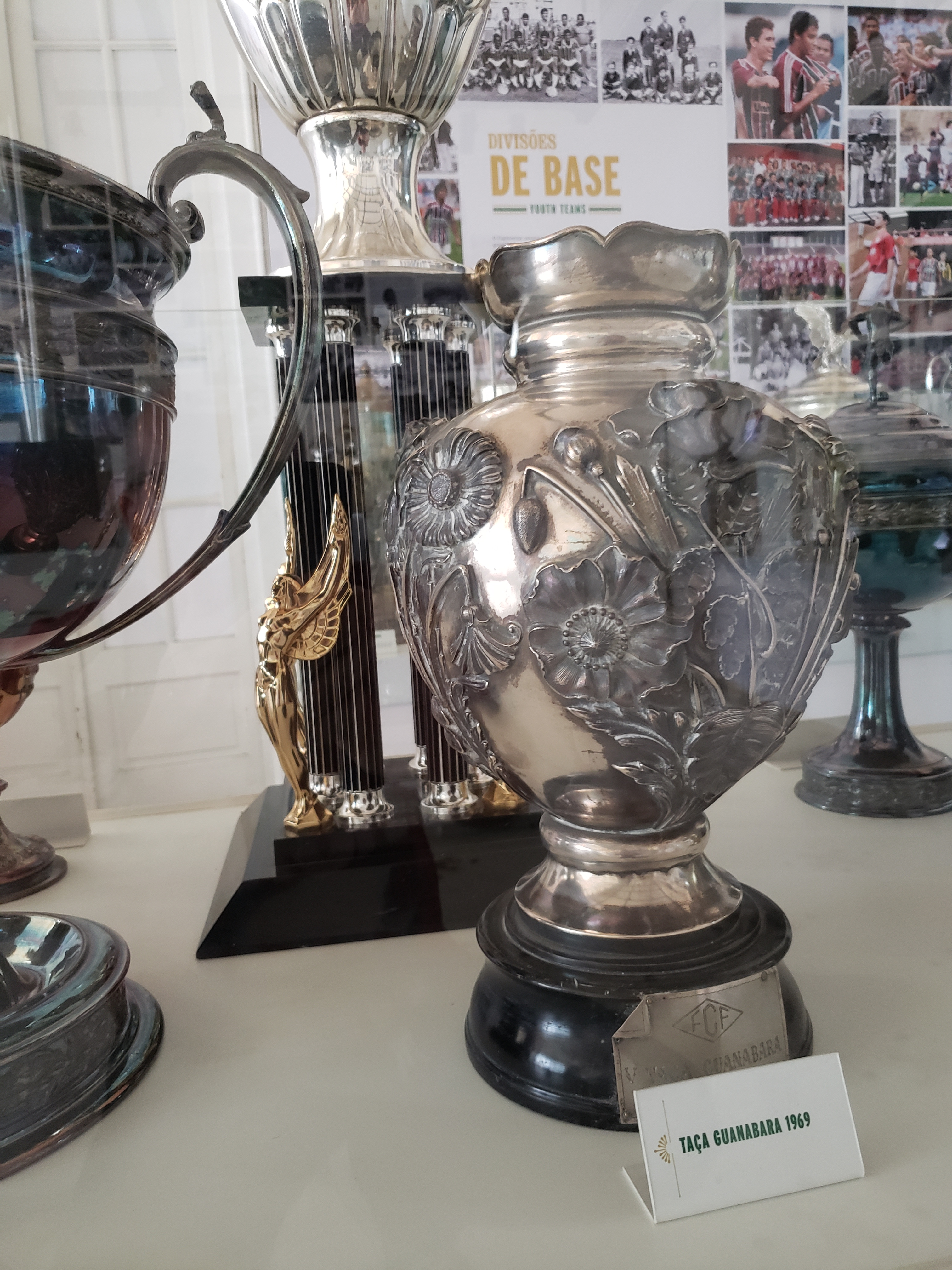 Taça Guanabara de 1969, então competição independente do Campeonato Carioca, conquistada pelo Fluminense Football Club.